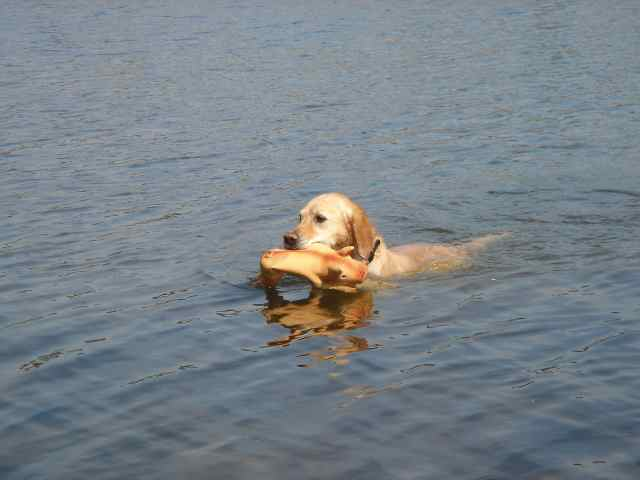 Golden Retriever bringt Spanferkel aus Fluss. Der oben gezeigte Golden Welpe hat sich entwickelt.